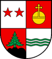 S Wappe vo de politische Gmeind Val-de-Charmey im Kanton Friburg, Schwiz.